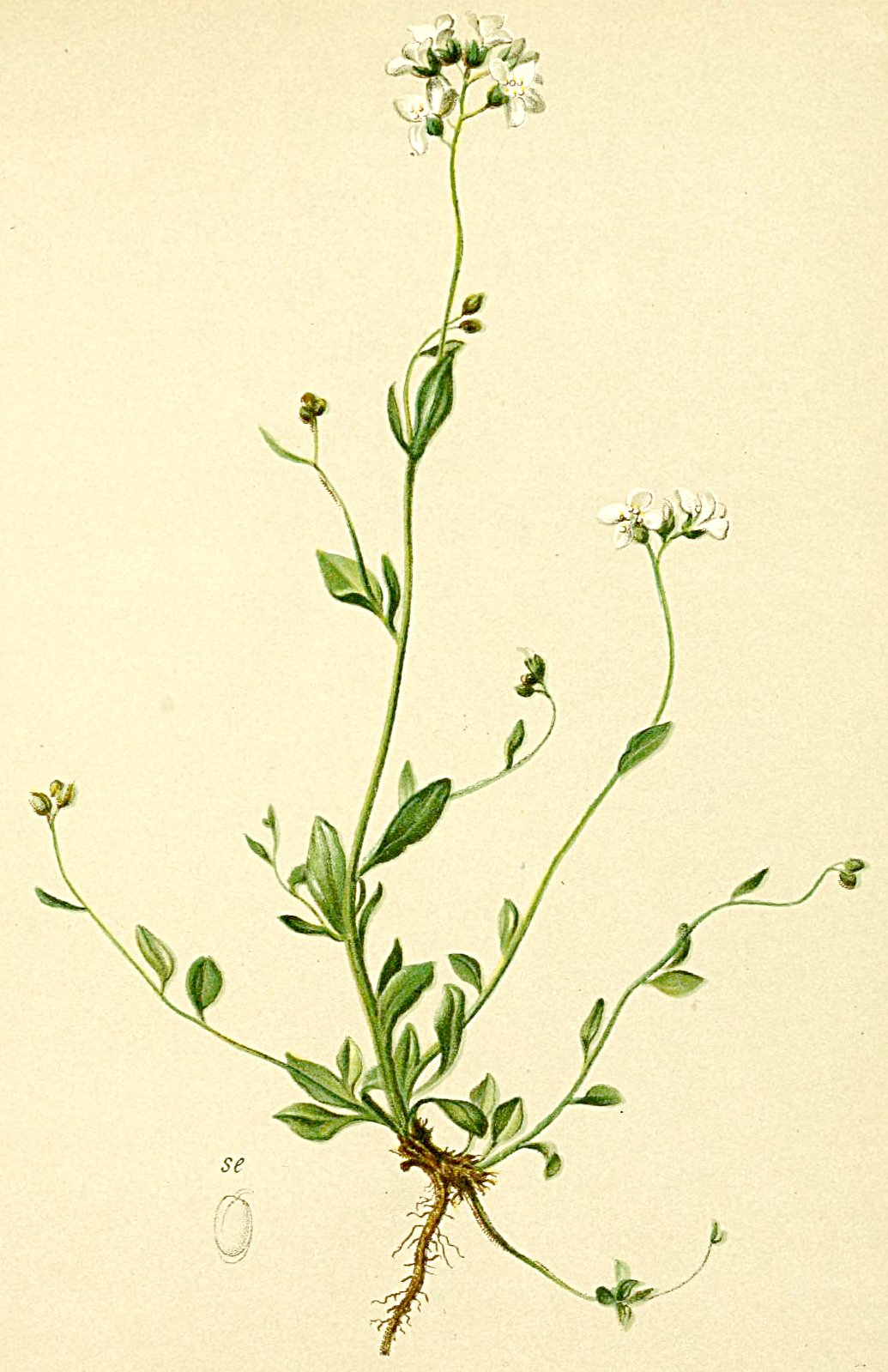 Cardaminopsis_halleri (Arabis halleri)